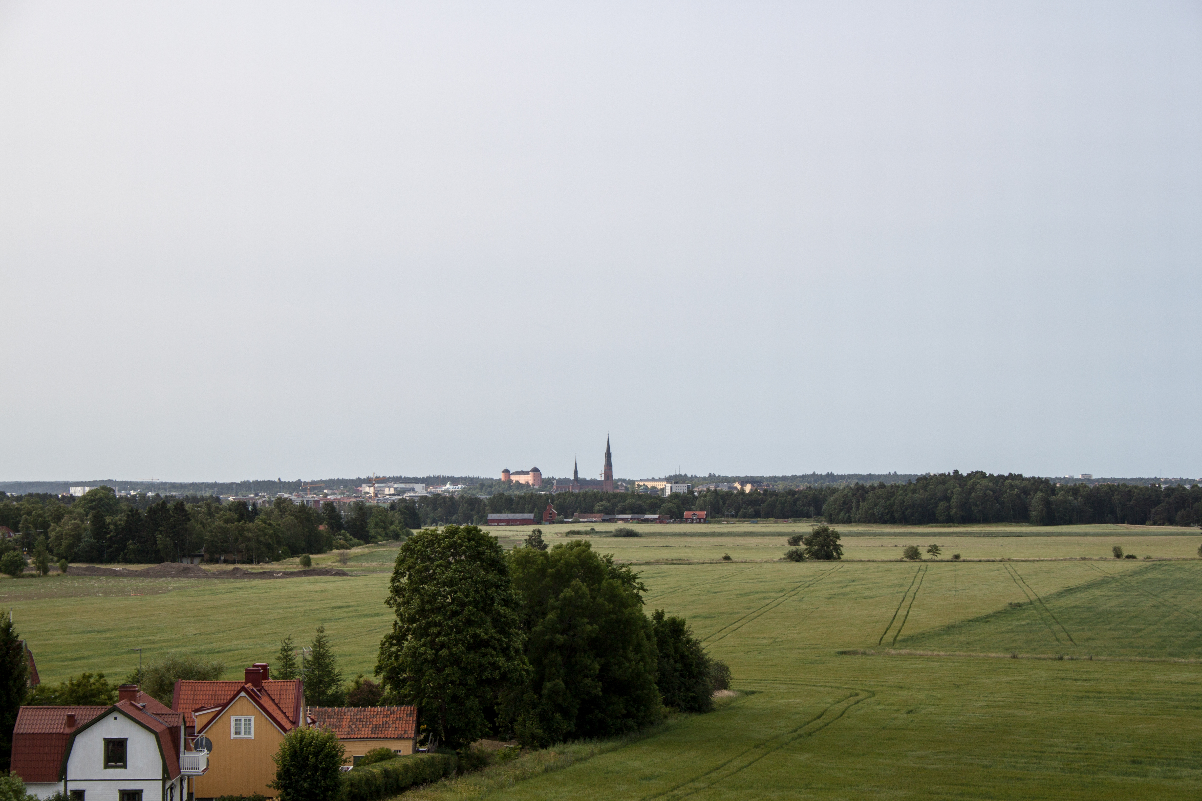 Royal mounds in Gamla Uppsala